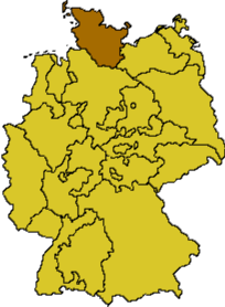 Nordelbische Evangelisch-Lutherische Kirche